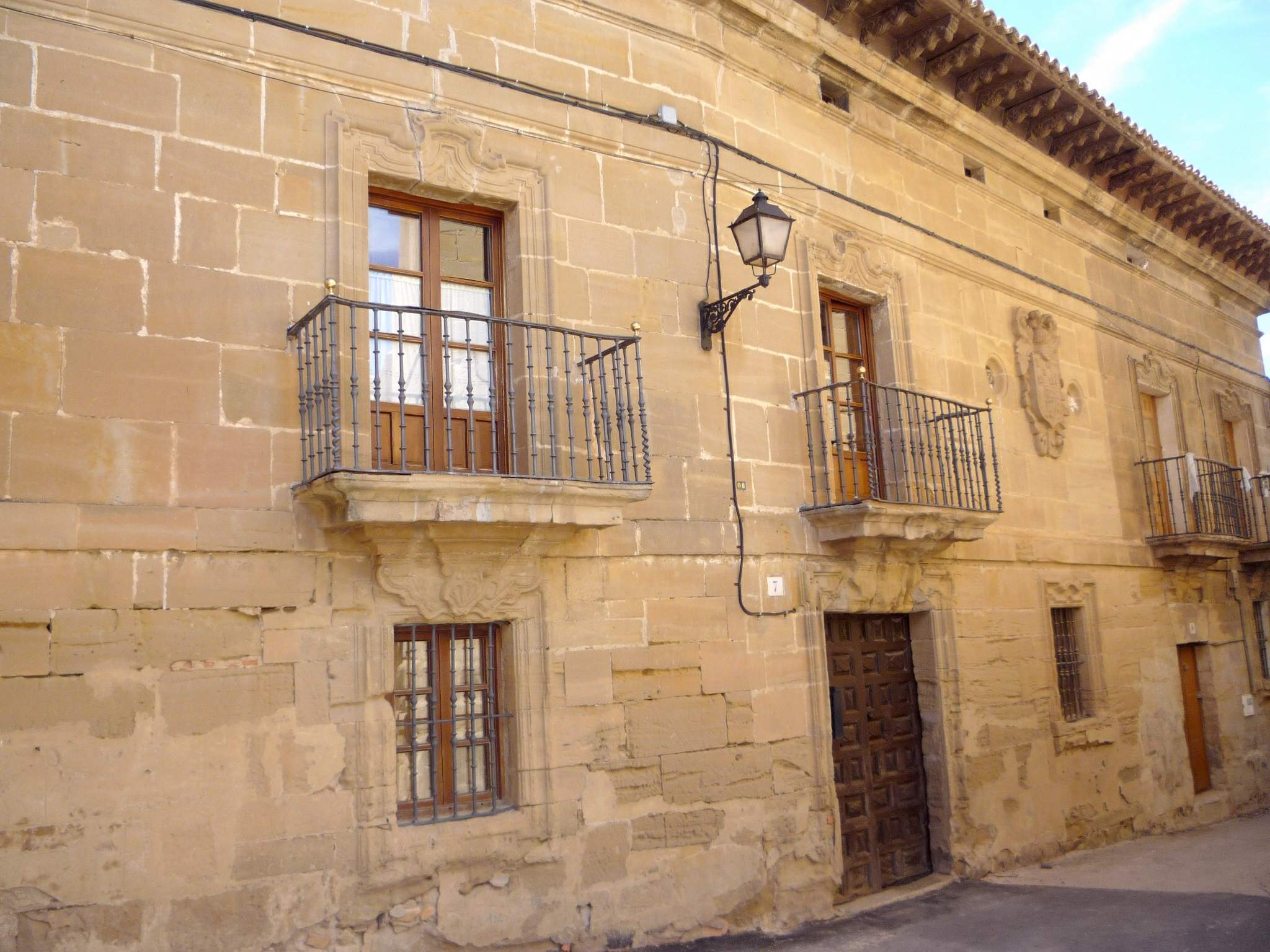 Palacio de Pobes (Ollauri, La Rioja)